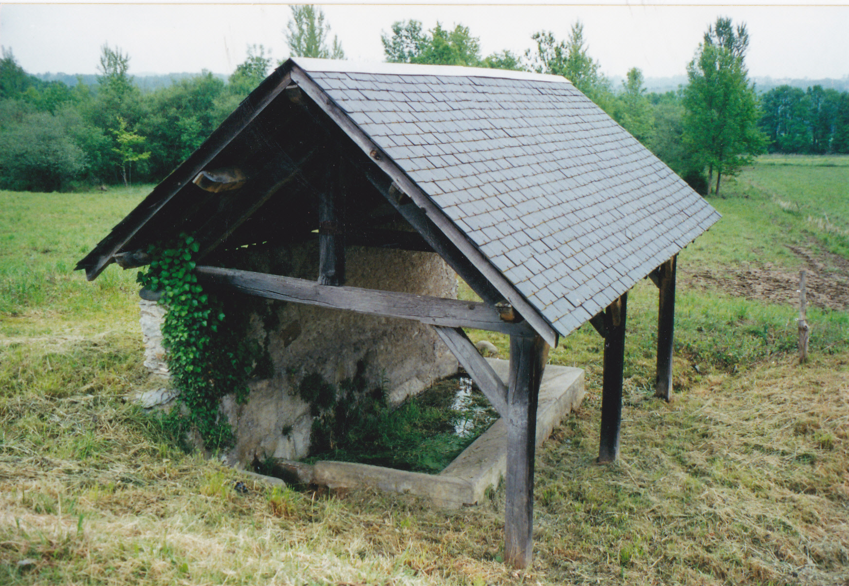 Le lavoir de la fontaine